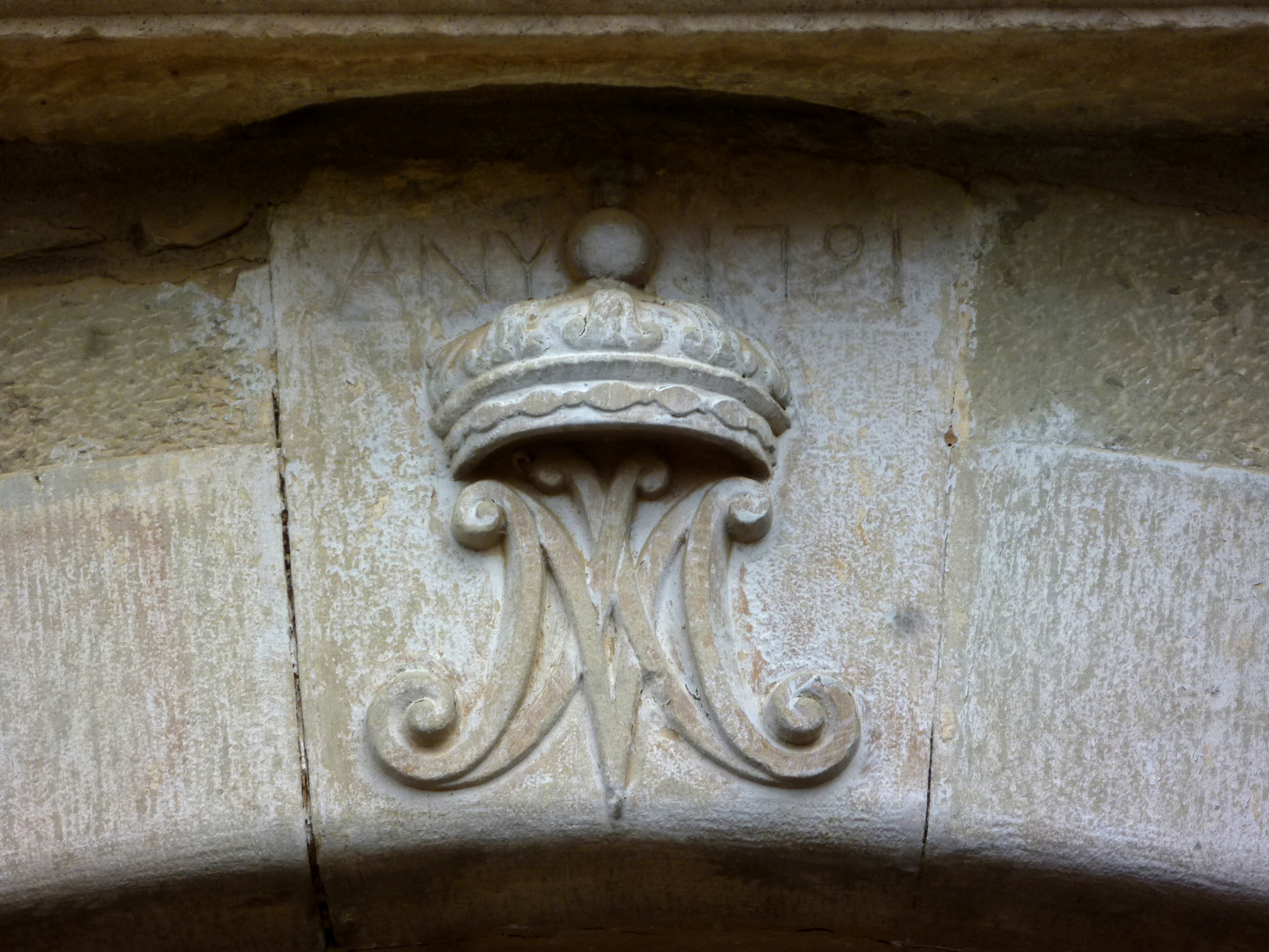 Cal Vidal de Montpalau (Ribera d'Ondara): relleu a la clau del portal